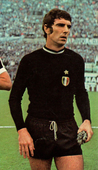 Il portiere di calcio italiano Dino Zoff alla Juventus nella stagione 1973-74, prima dell'inizio di una partita allo stadio Comunale di Torino.